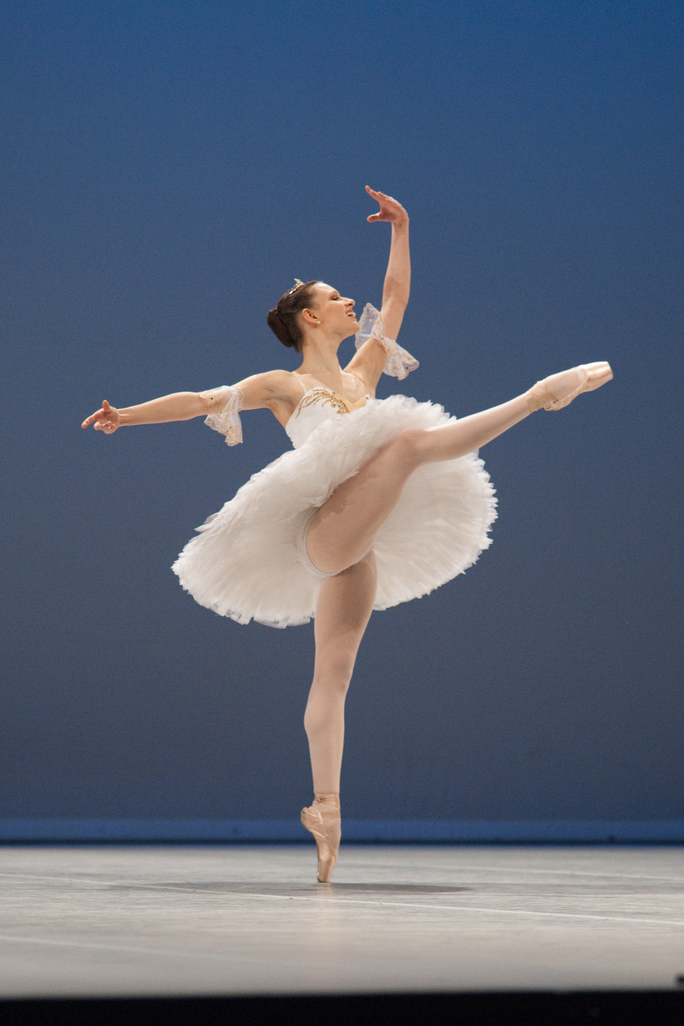 Variation extraite de Raymonda au Prix de Lausanne 2010. The making of this document was supported by Wikimedia CH. (Submit your project!) For all the files concerned, please see the category Supported by Wikimedia CH.